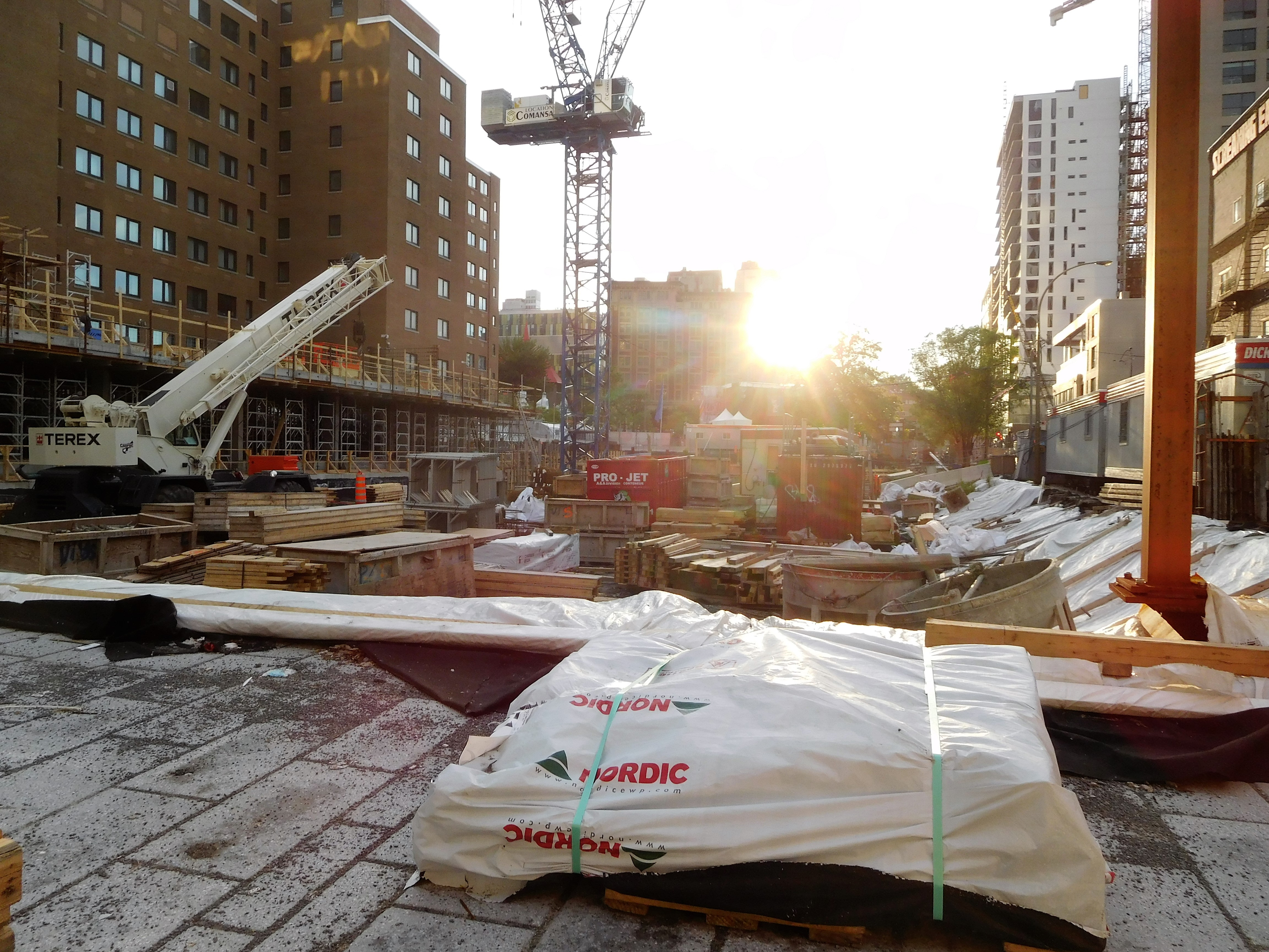 Esplanade Tranquille, en construction, à l'angle des rues Sainte-Catherine et Clark, à Montréal